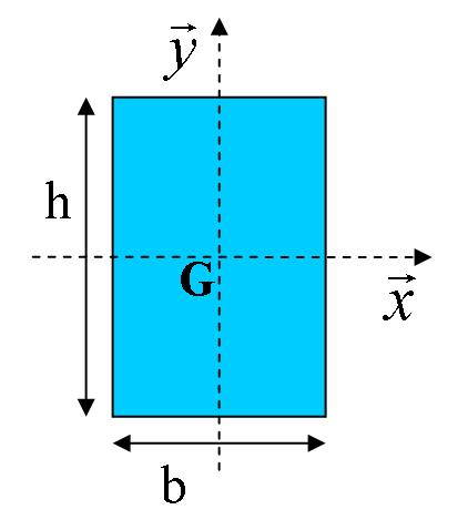 Section rectangulaire: schéma pour formules de moment quadratique. Auteur: Xavier Lory.